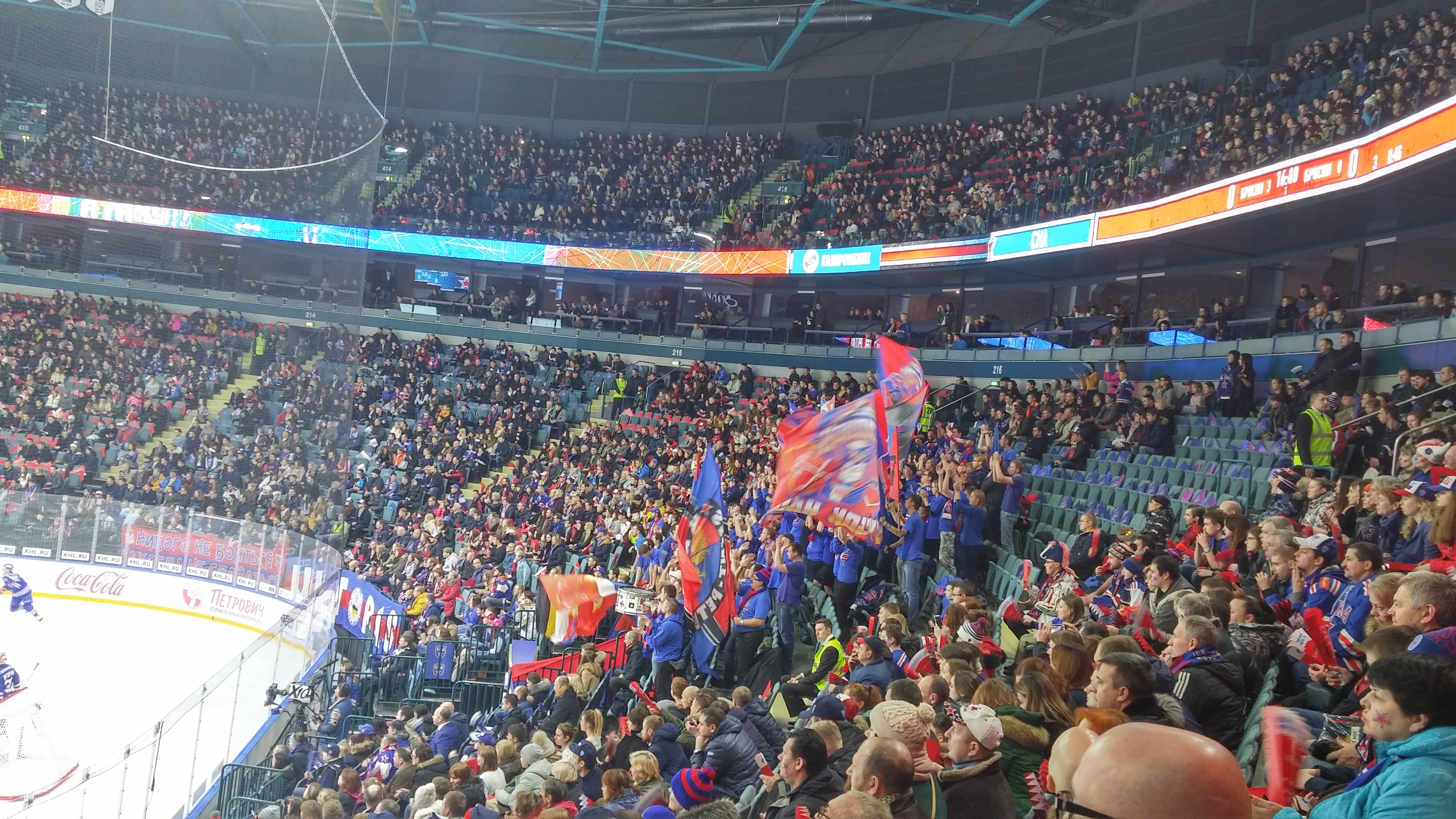 Фан сектор на домашней арене хоккейного клуба СКА (Санкт-Петербург)